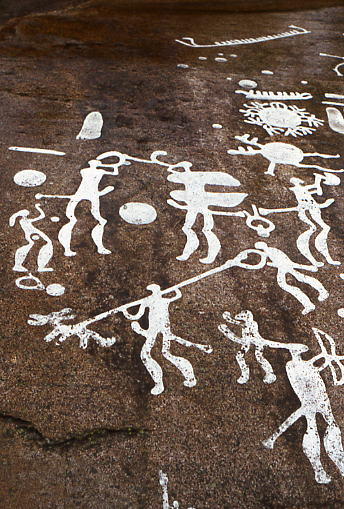 Gravure préhistorique de la région de Tanum